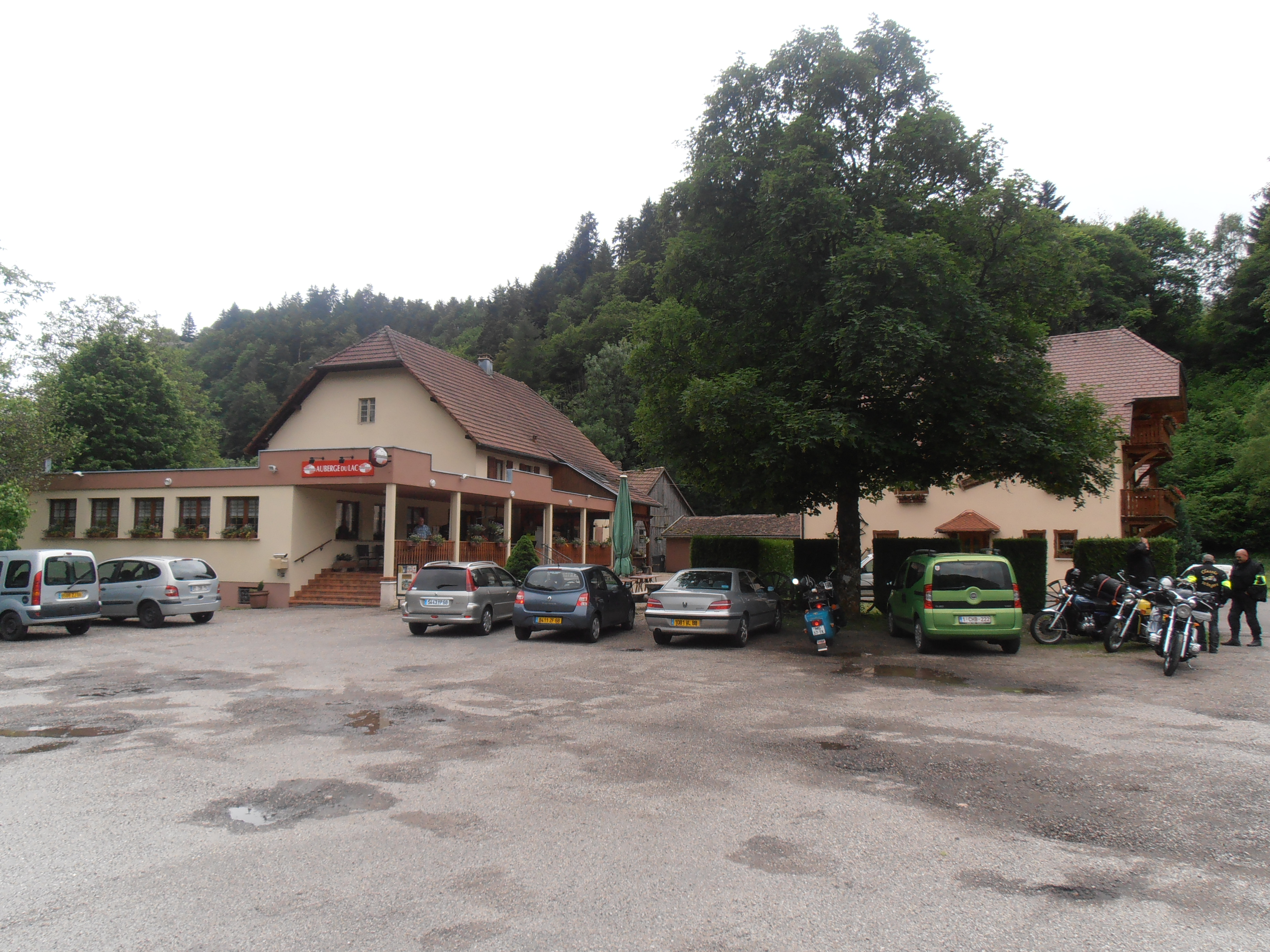 Barrage du lac de Kruth-Wildenstein Département du Haut-Rhin (France Bâtiments d'accueil